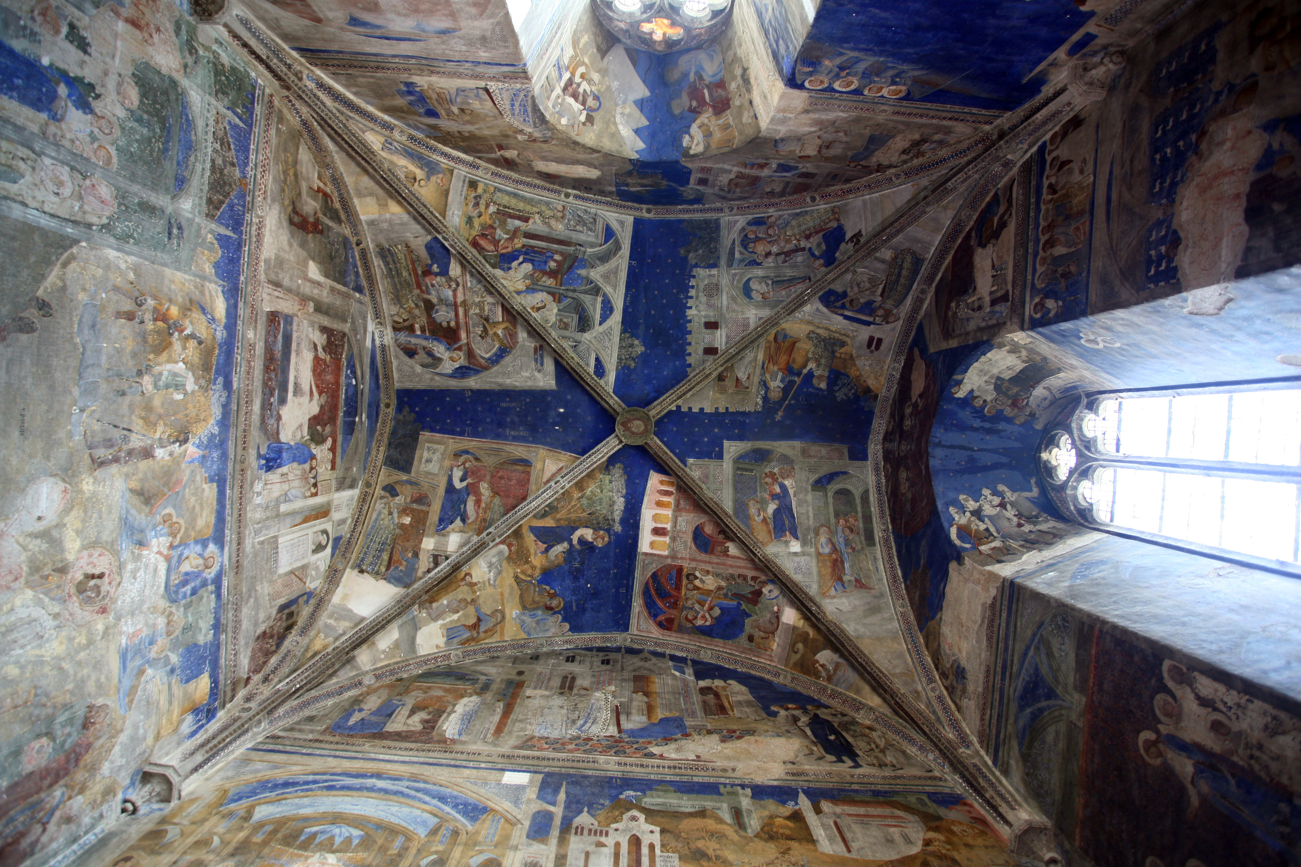 Plafond de la chapelle Saint-Martial, tour saint-Jean, Palais des Papes, Avignon, Vaucluse, France